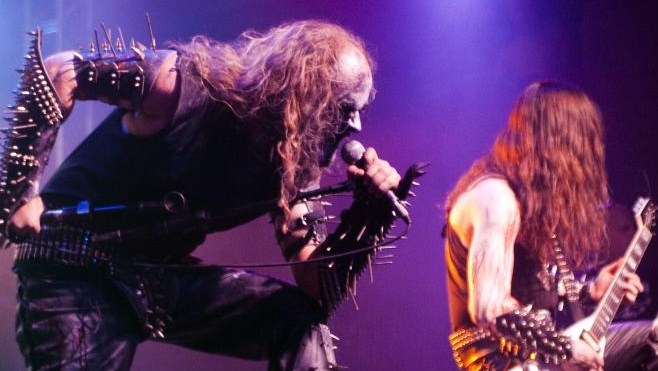 Pest e Infernus de la banda noruega de black metal Gorgoroth.